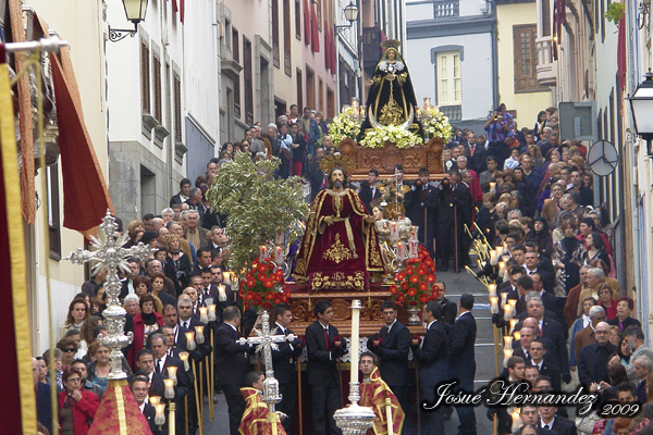 Procesión del Santísimo Cristo del Huerto a su paso por la calle Hermano Apolinar (antigua calle de La Olla), en la tarde del Domingo de Ramos.